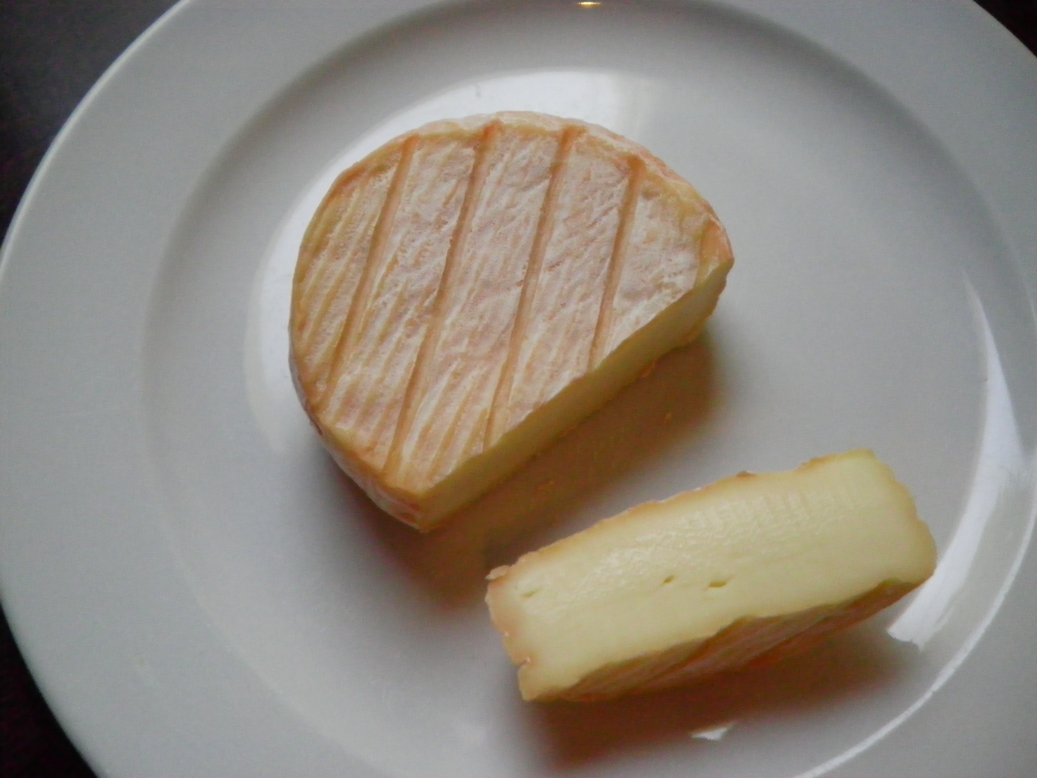 Schlierbacher Schloßkäse; 70 mm Durchmesser; 20 mm Höhe